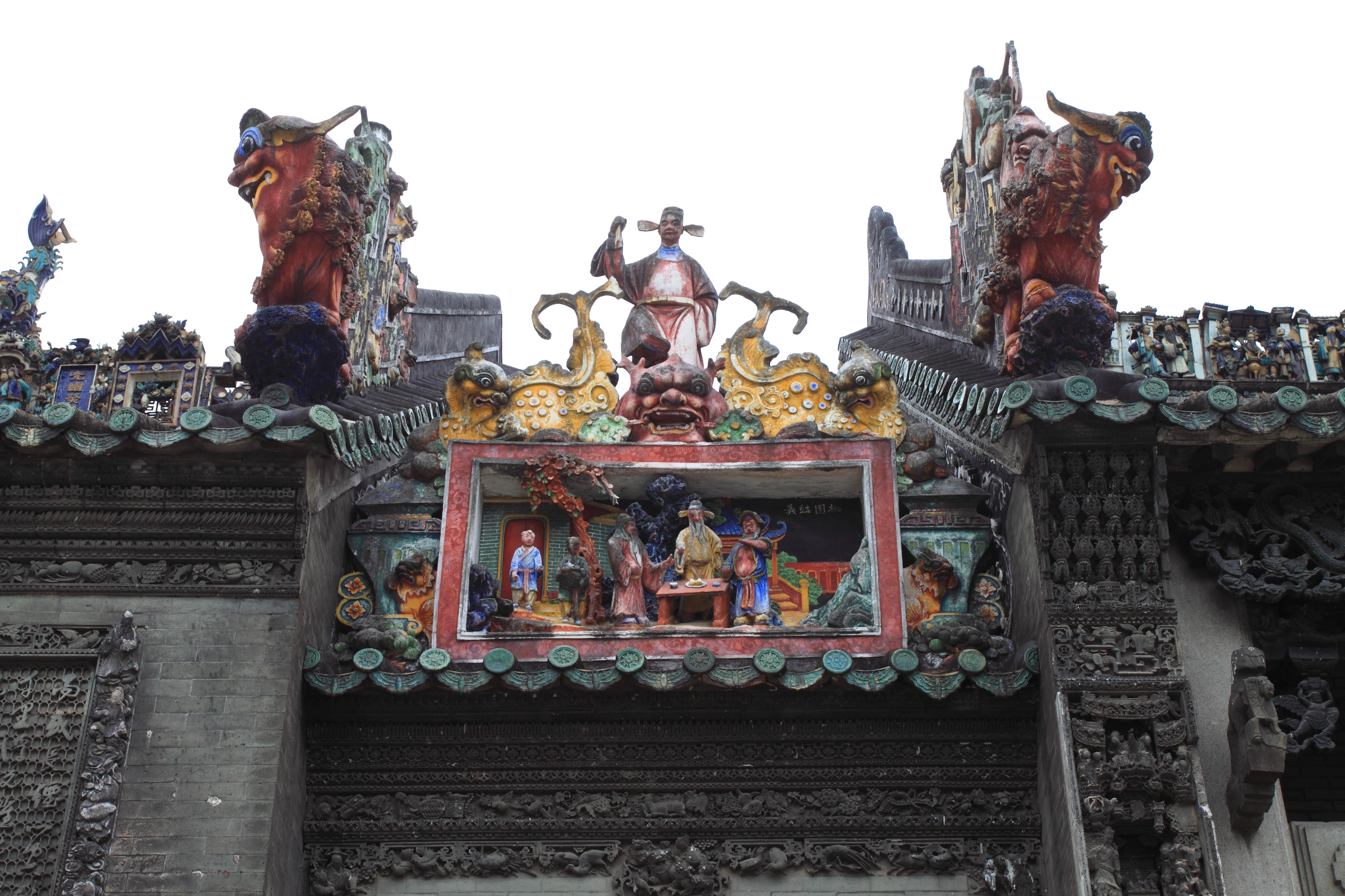 广州陈家祠堂 —— 南部大门西侧小门屋脊的瓷塑 Ahnentempel der Familie Chen in Guangzhou. Dachreiter auf dem First des westlichen kleinen Tores beim großen Tor des Südteils